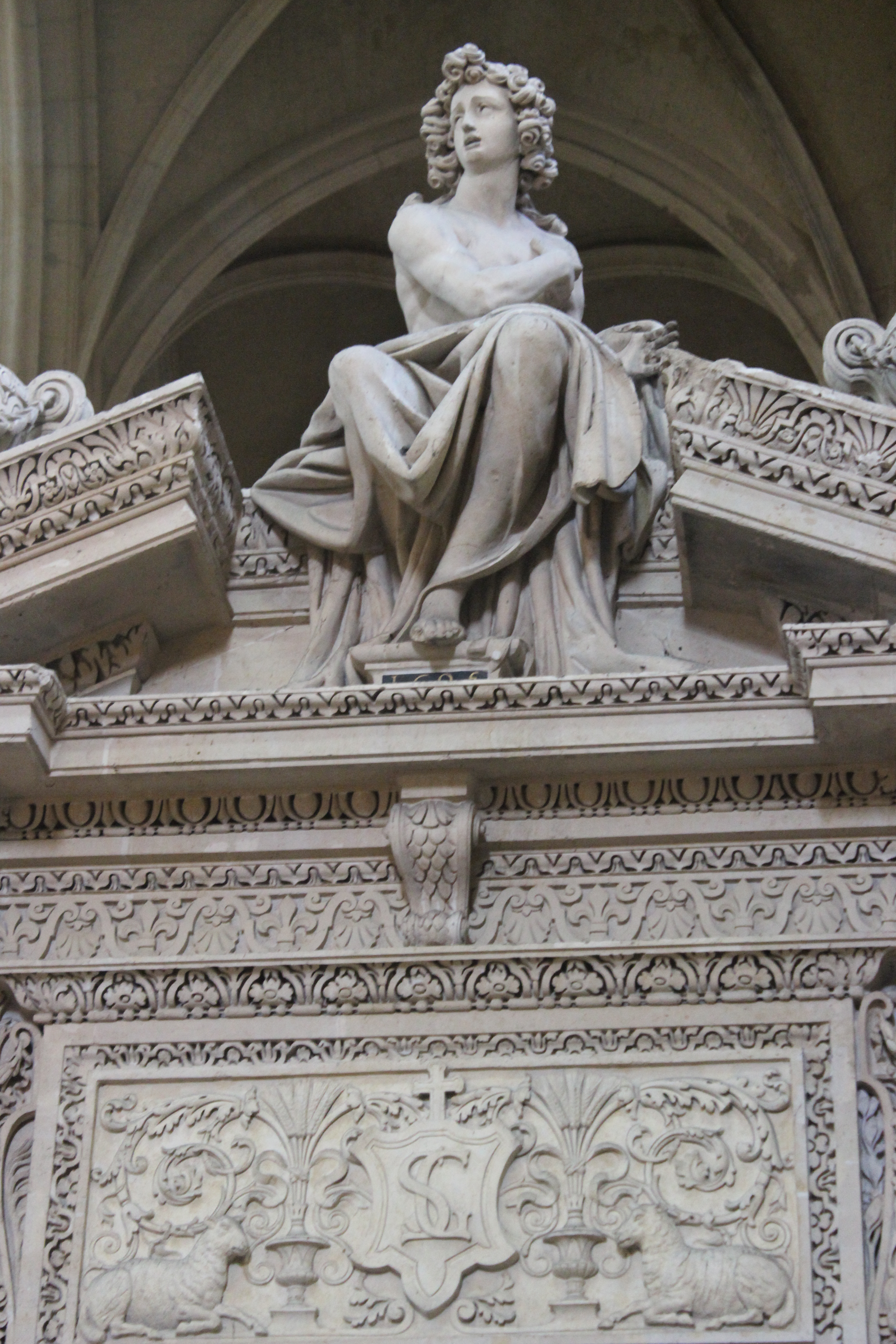 París. Saint Étienne du Mont. Jubé.